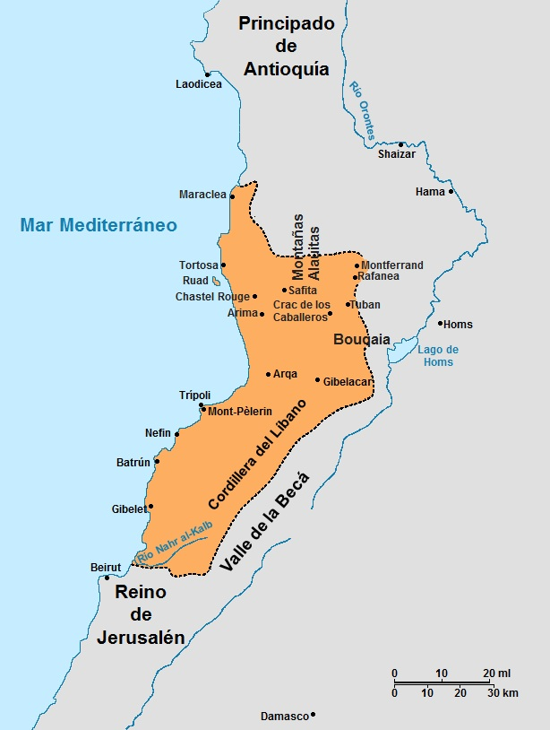 Condado de Trípoli, siglo XII.